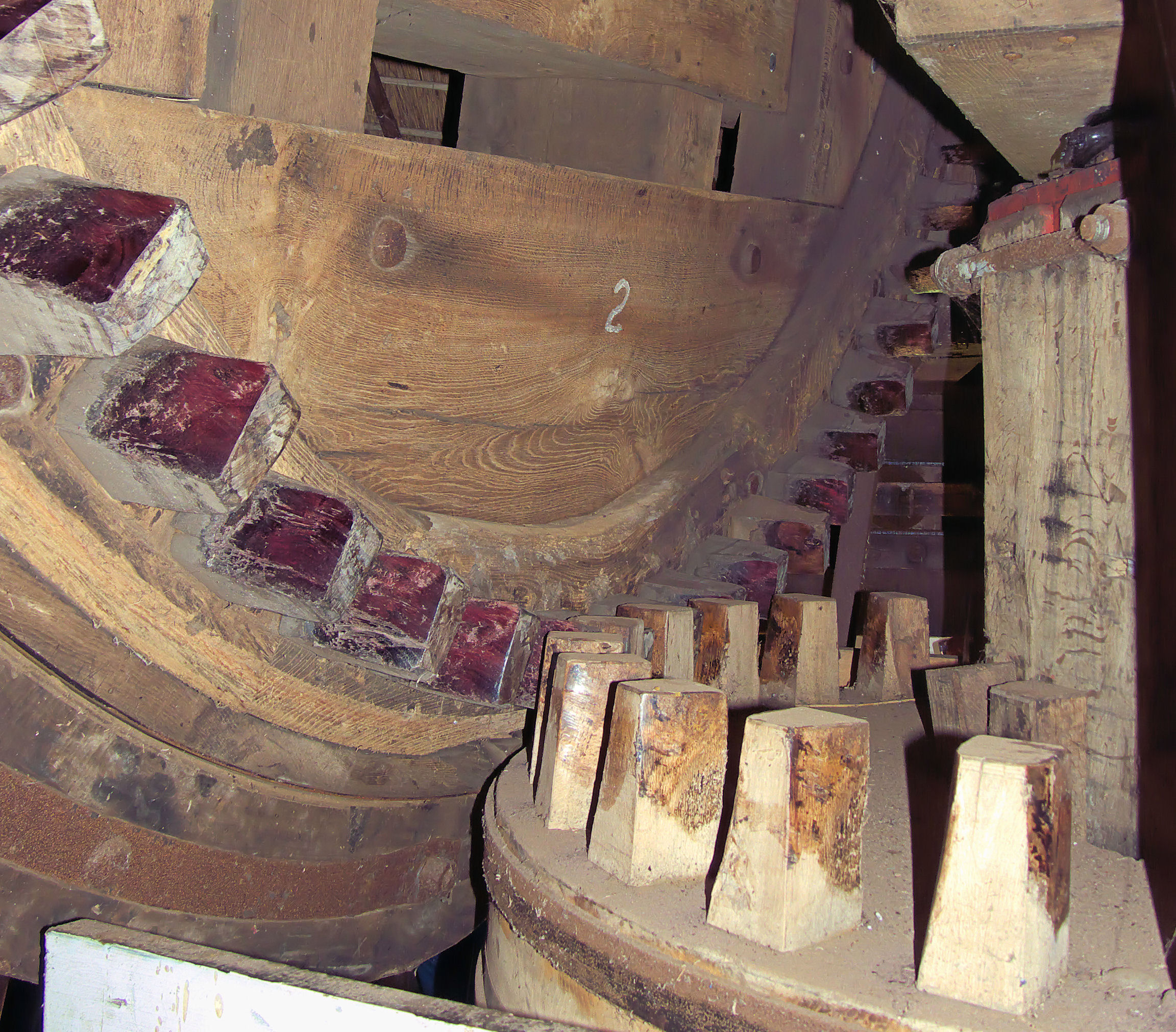 Tweede Broekermolen bovenwiel met bonkelaar